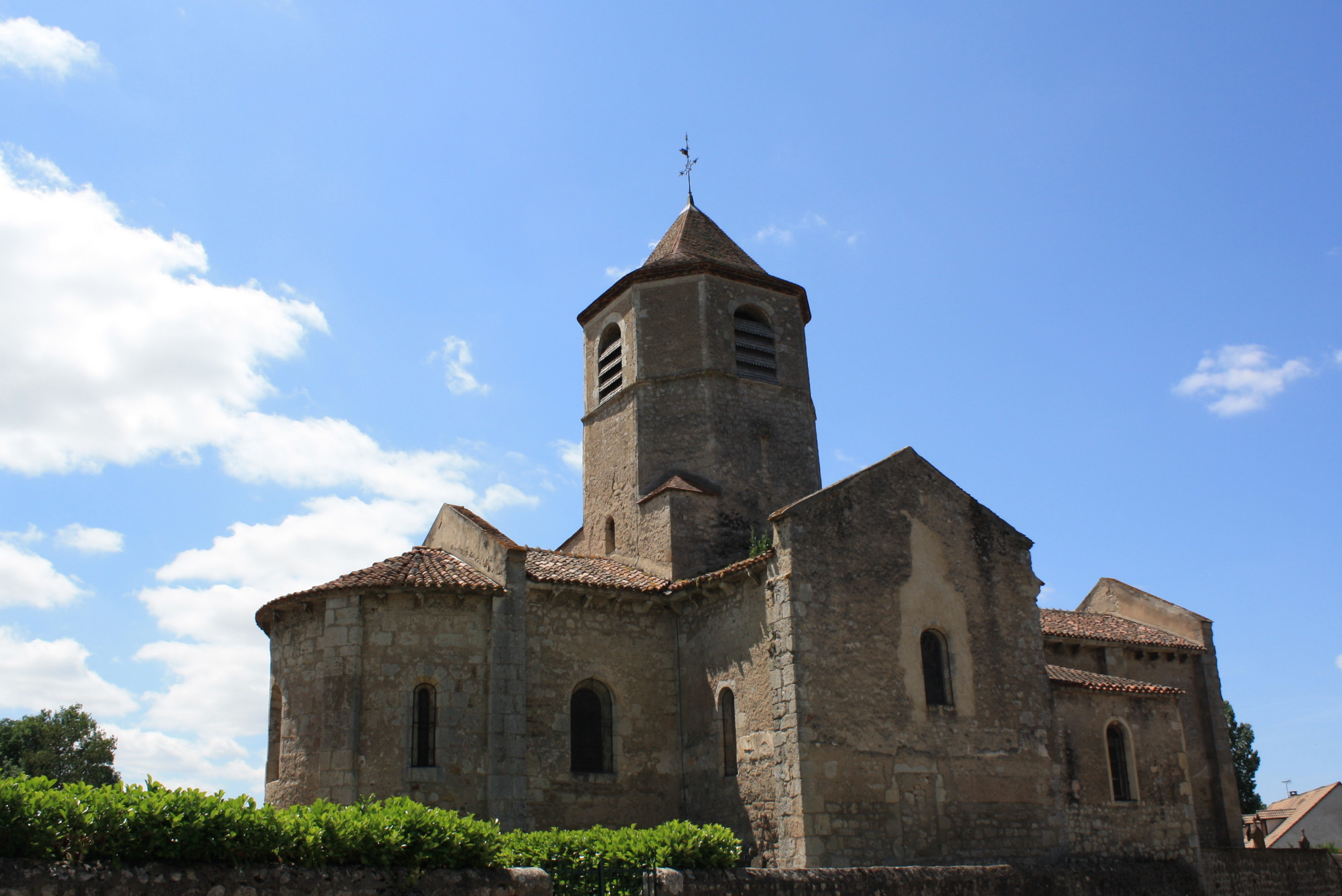 Eglise Saint